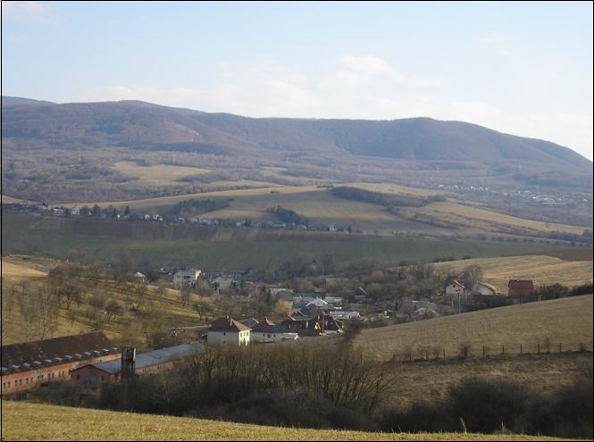 Pohľad na Nemcovce od zimnej studne.